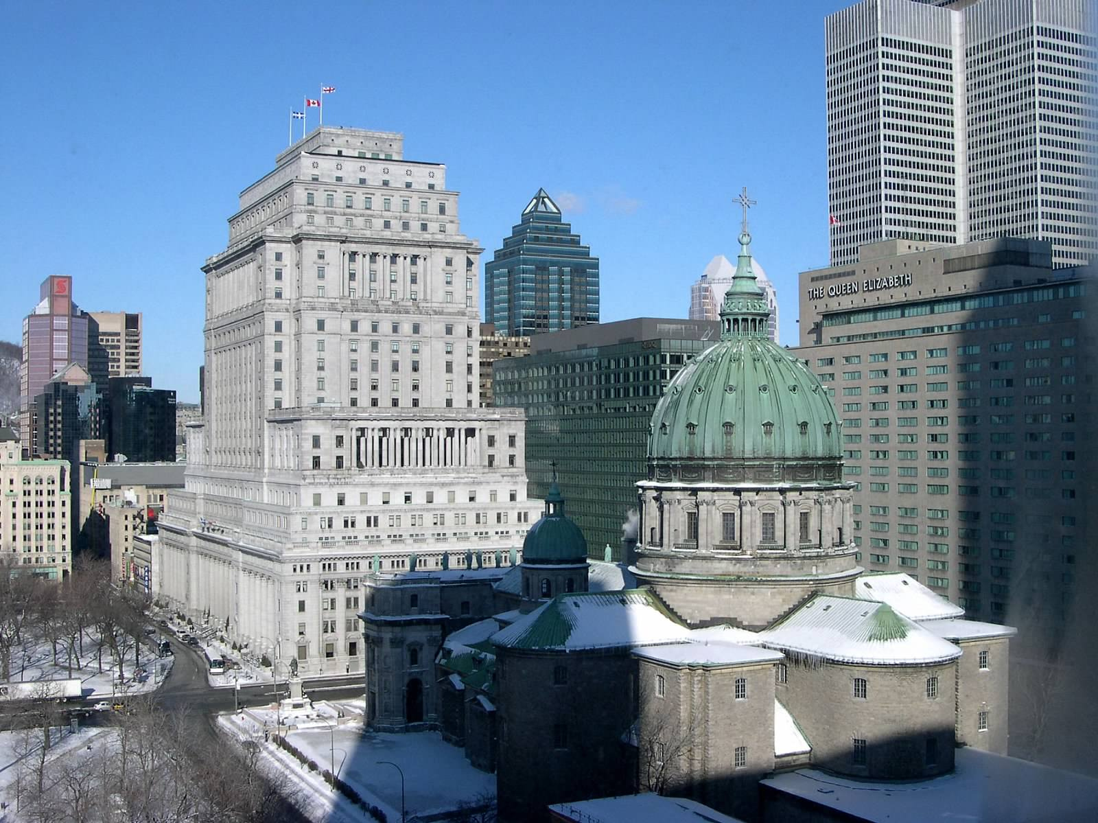 Marie Reine du Monde et Édifice Sunlife